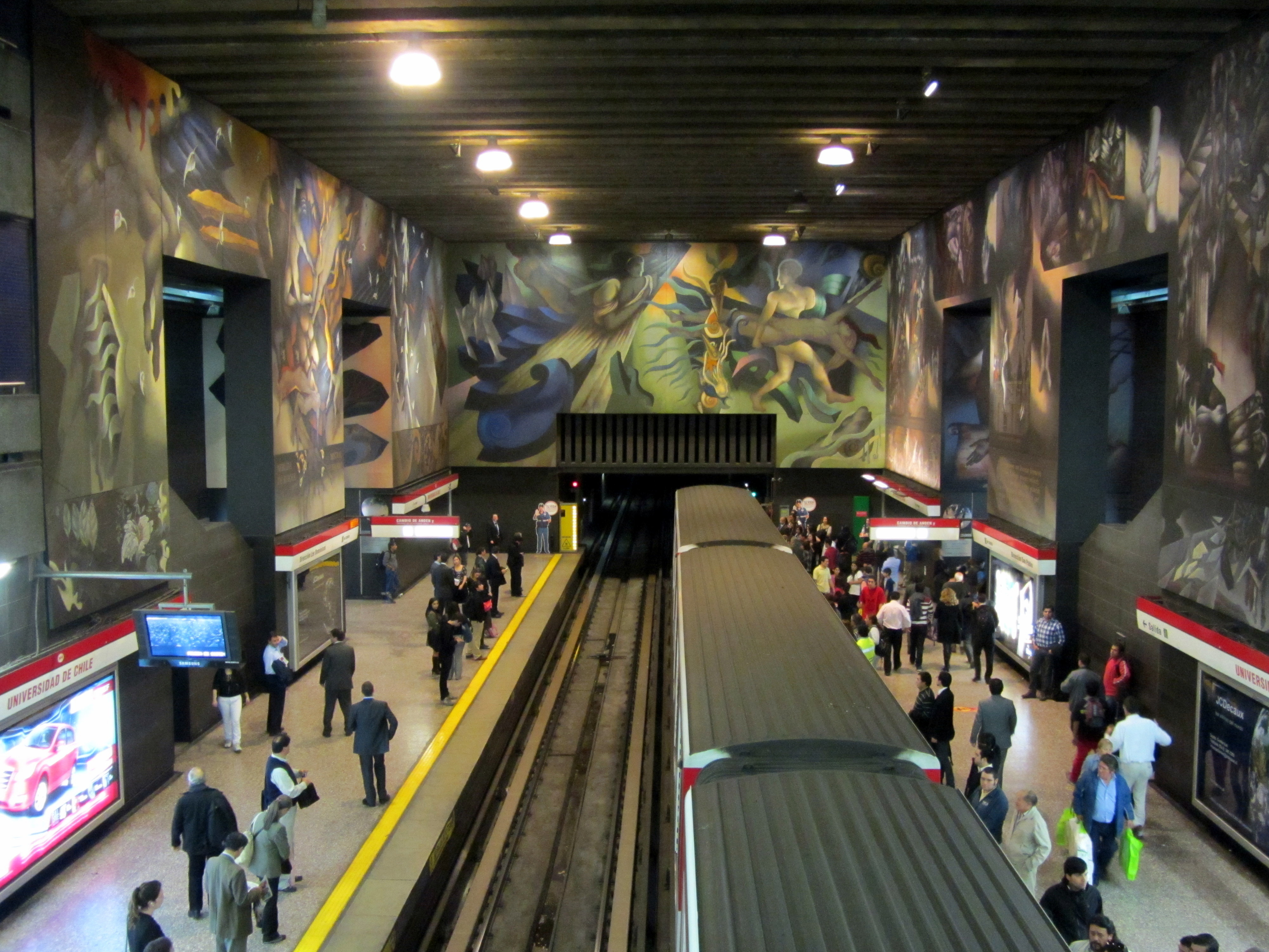 Tributo a nuestro océano, mural del pintor chileno Mario Toral que forma parte de la gran obra titulada Memoria visual de una nación, metro Universidad de Chile, en Santiago de Chile. Este panel está sobre el túnel poniente. A la izquierda (S), Homenaje a la poesía; a la derecha (N), Los conflictos.